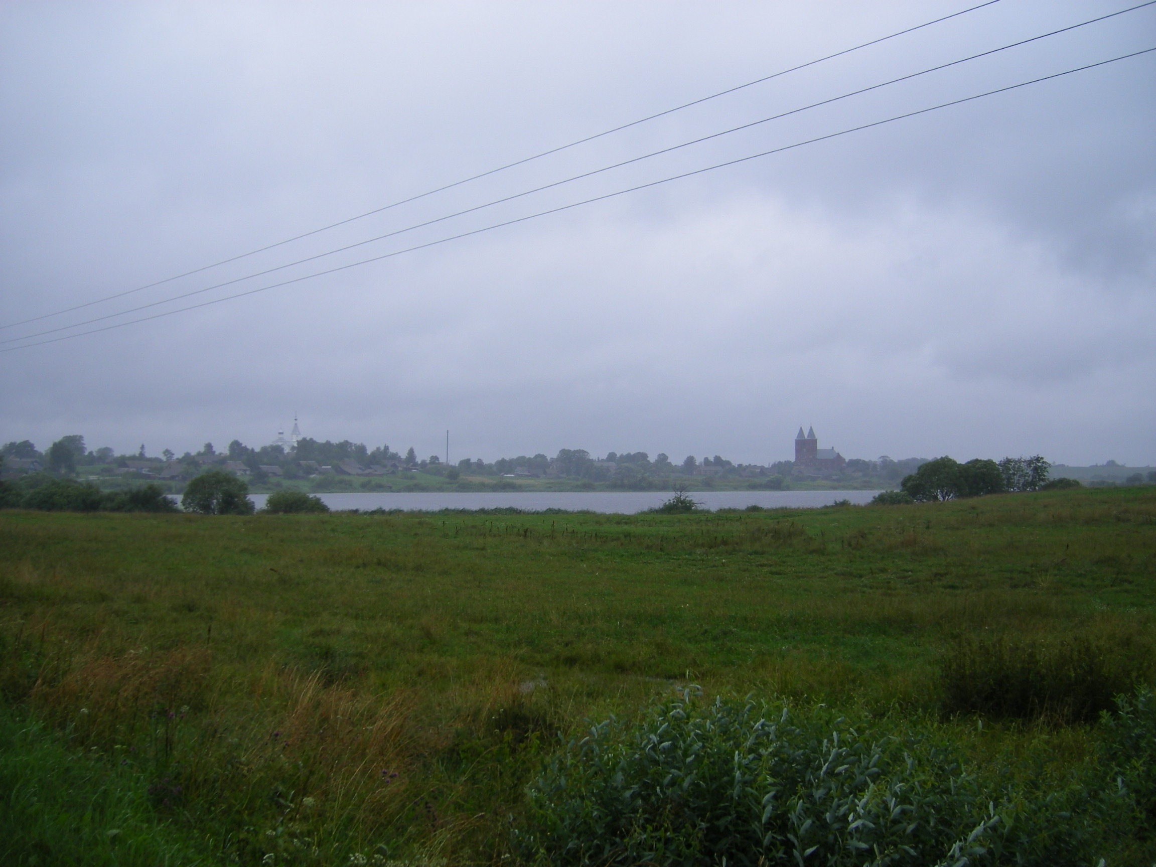 Ikazň village, Braslav Raion